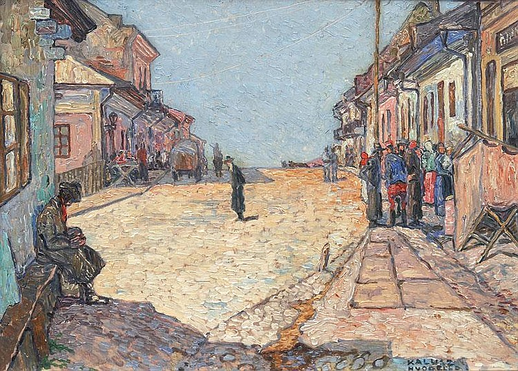 Straßenszene in Kalusz, Öl auf Malpappe, 41,5 x 54 cm